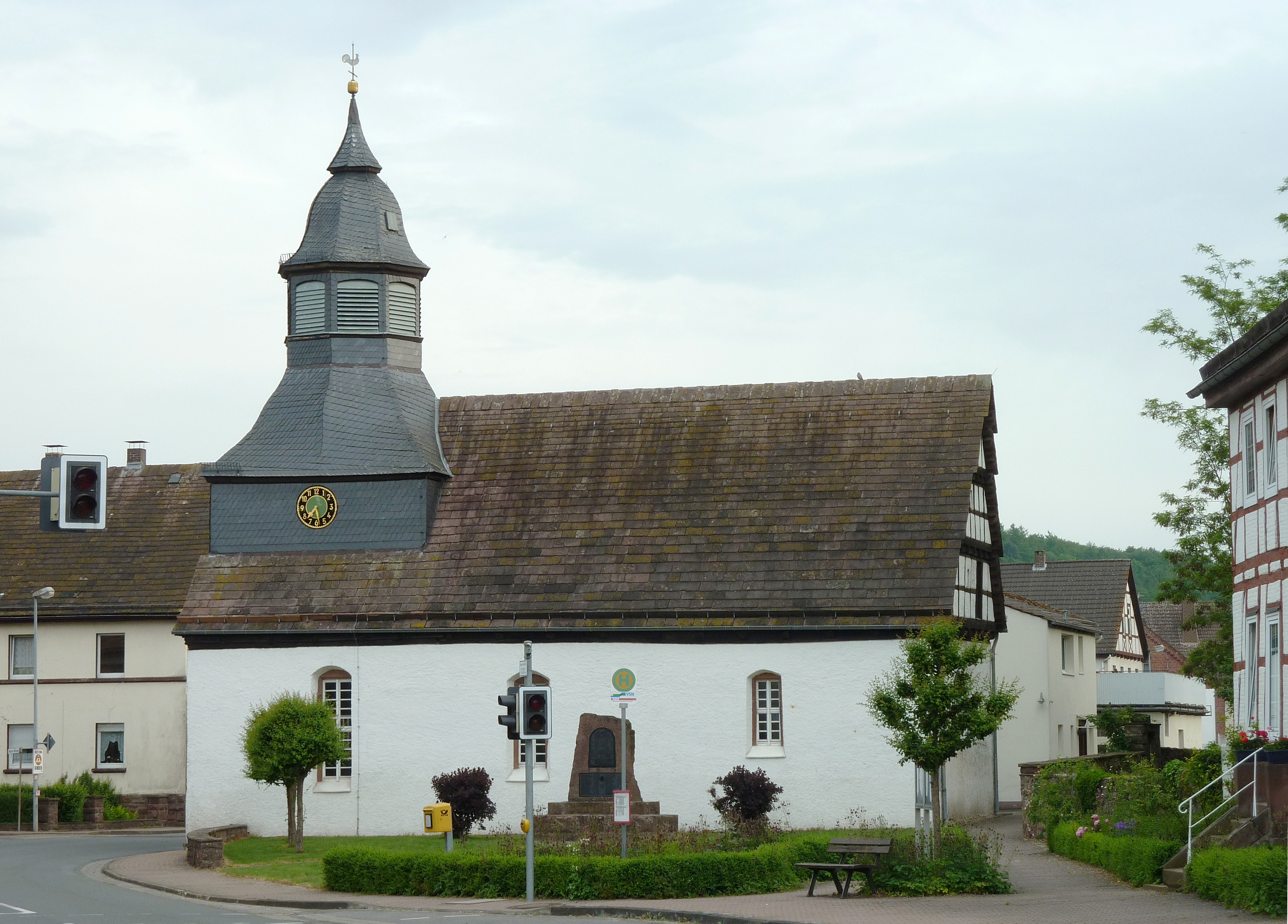 Ev.-luth. St.-Johannis-Kirche in Meinbrexen, Gemeinde Lauenförde, Landkreis Holzminden. Erbaut 1585-89 durch Statius von Münchhausen